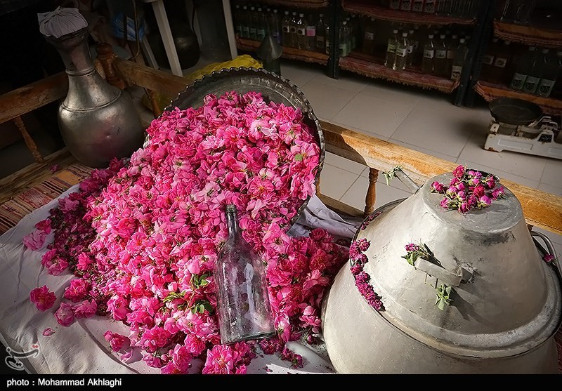 گلابگیری در قمصر کاشان